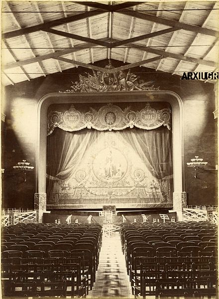 Teatre de la Unió Liberal de Granollers en una imatge conservada a l'Arxiu Municipal